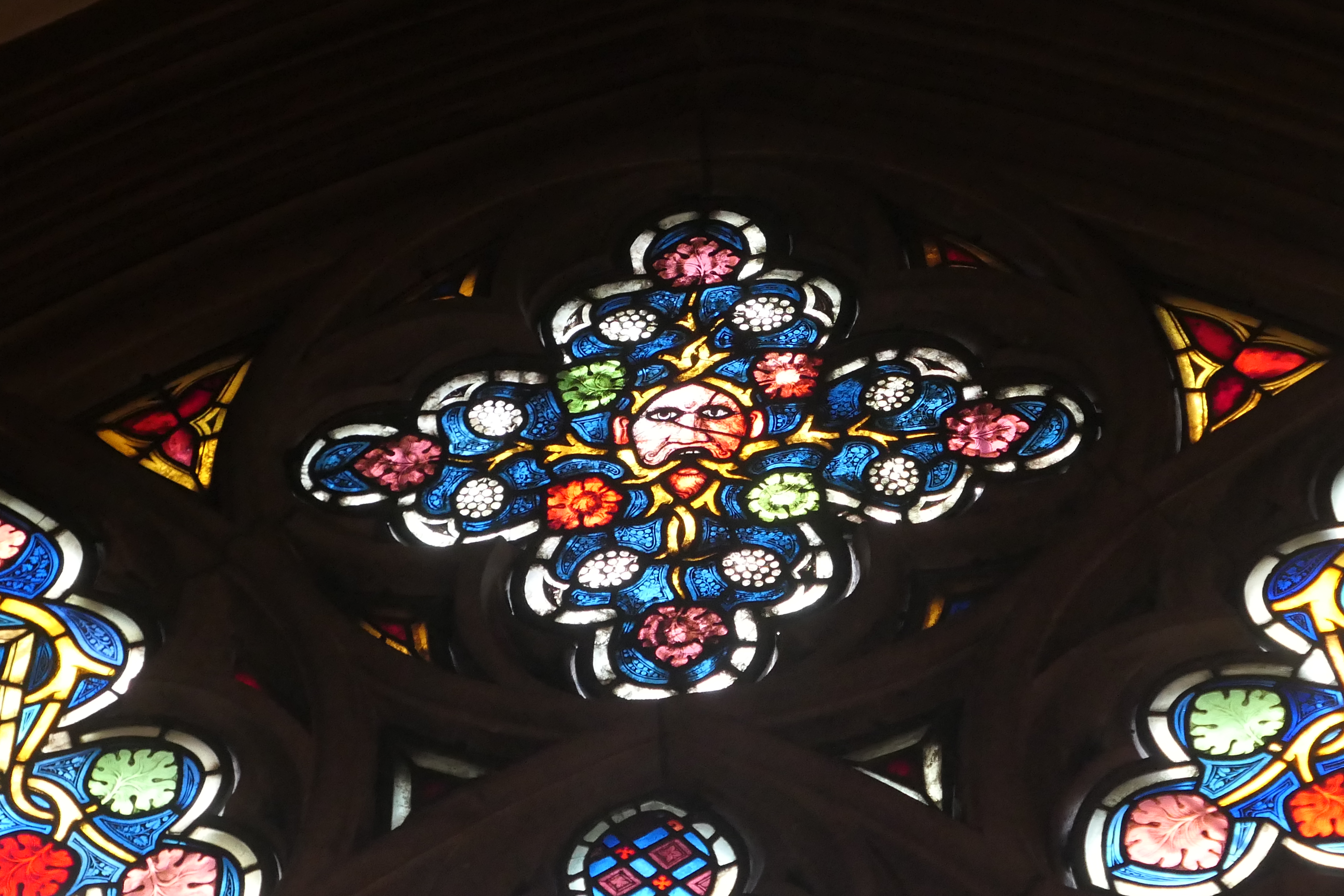 Stained glass windows of transept (Freiburg Minster) Blattmaske Mitte um 1340